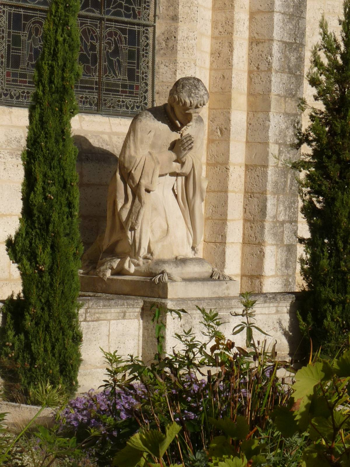 statue du comte Jean à l'arrière de la cathédrale et cour du musée, Angoulême, Charente, France